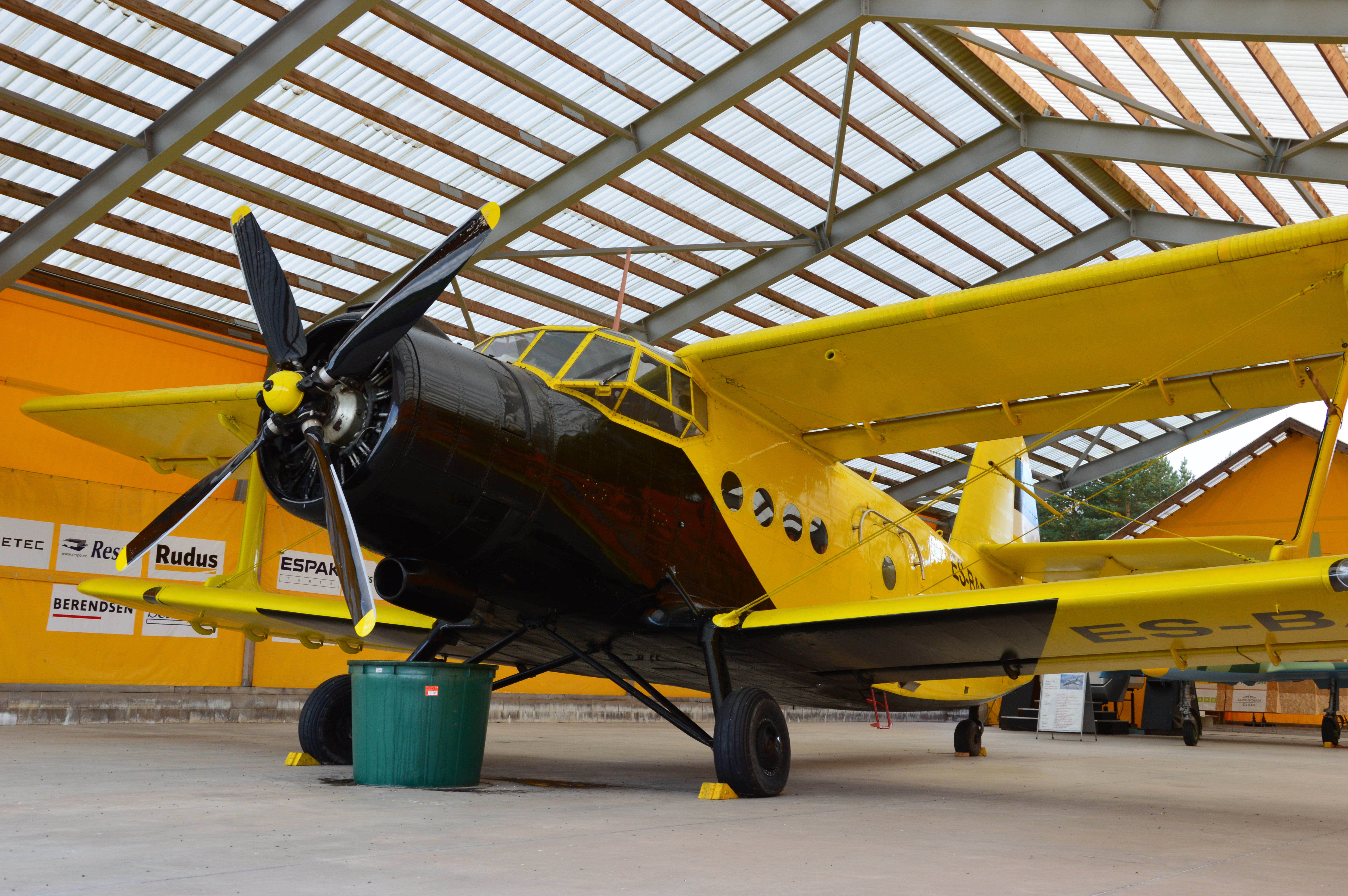 Antonov An-2 Eesti Lennundusmuuseumis.